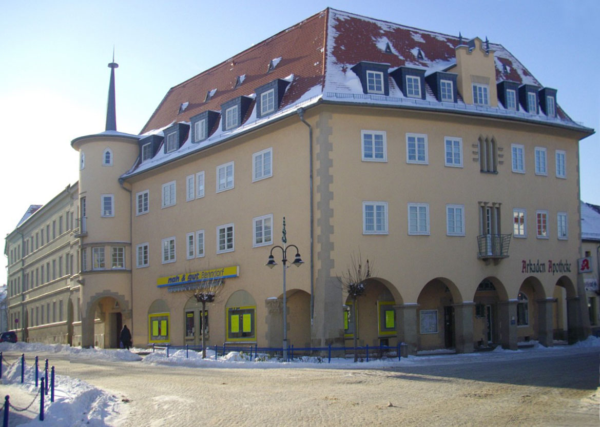 Groitzsch, Landkreis Leipzig, Arkadenhaus in der Breitstraße 16